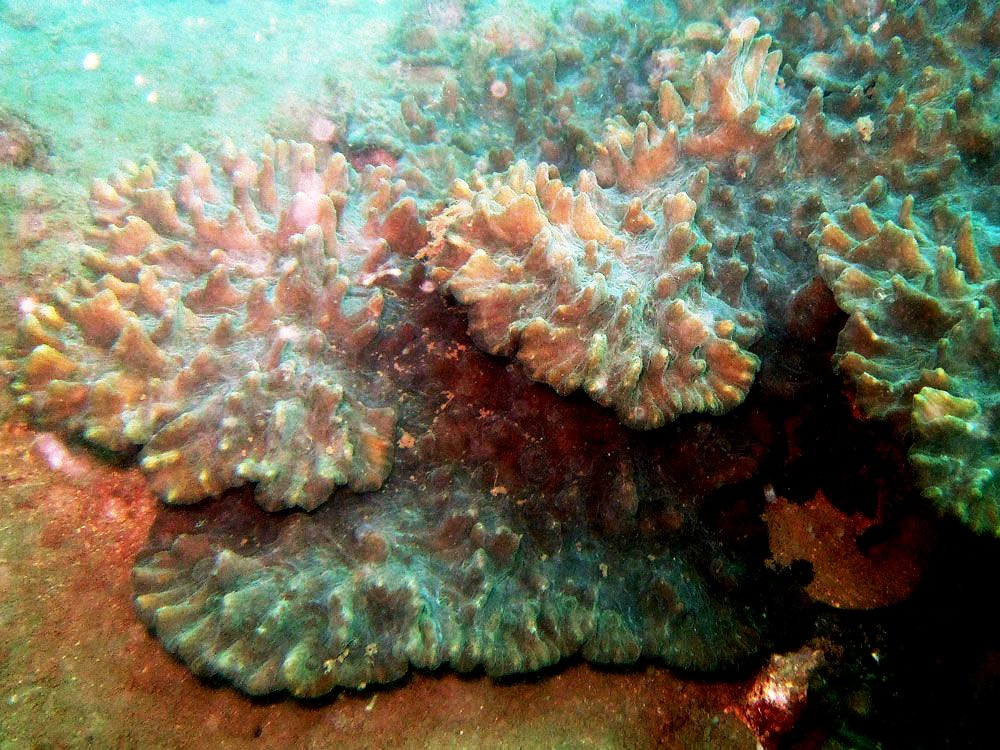 Pectinia lactuca, Koh Phangan, Tailandia